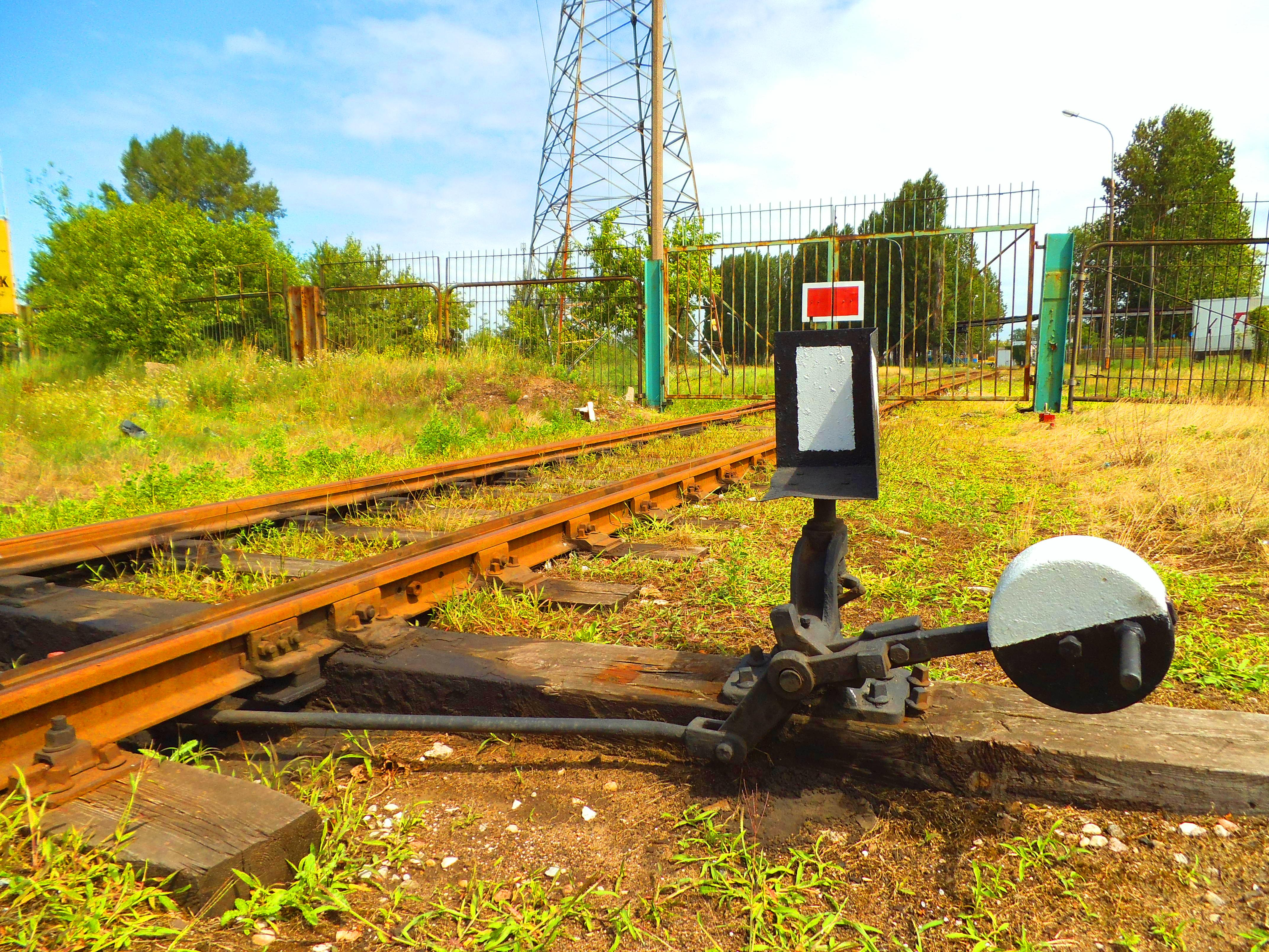 Bocznica kolejowa prowadząca na teren Elany w Toruniu